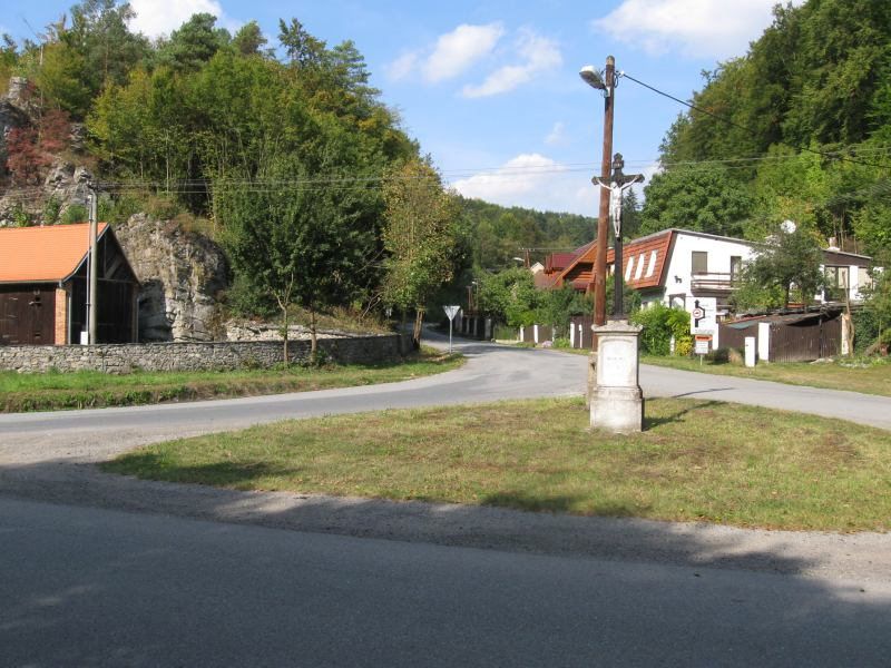 Josefov u Adamova